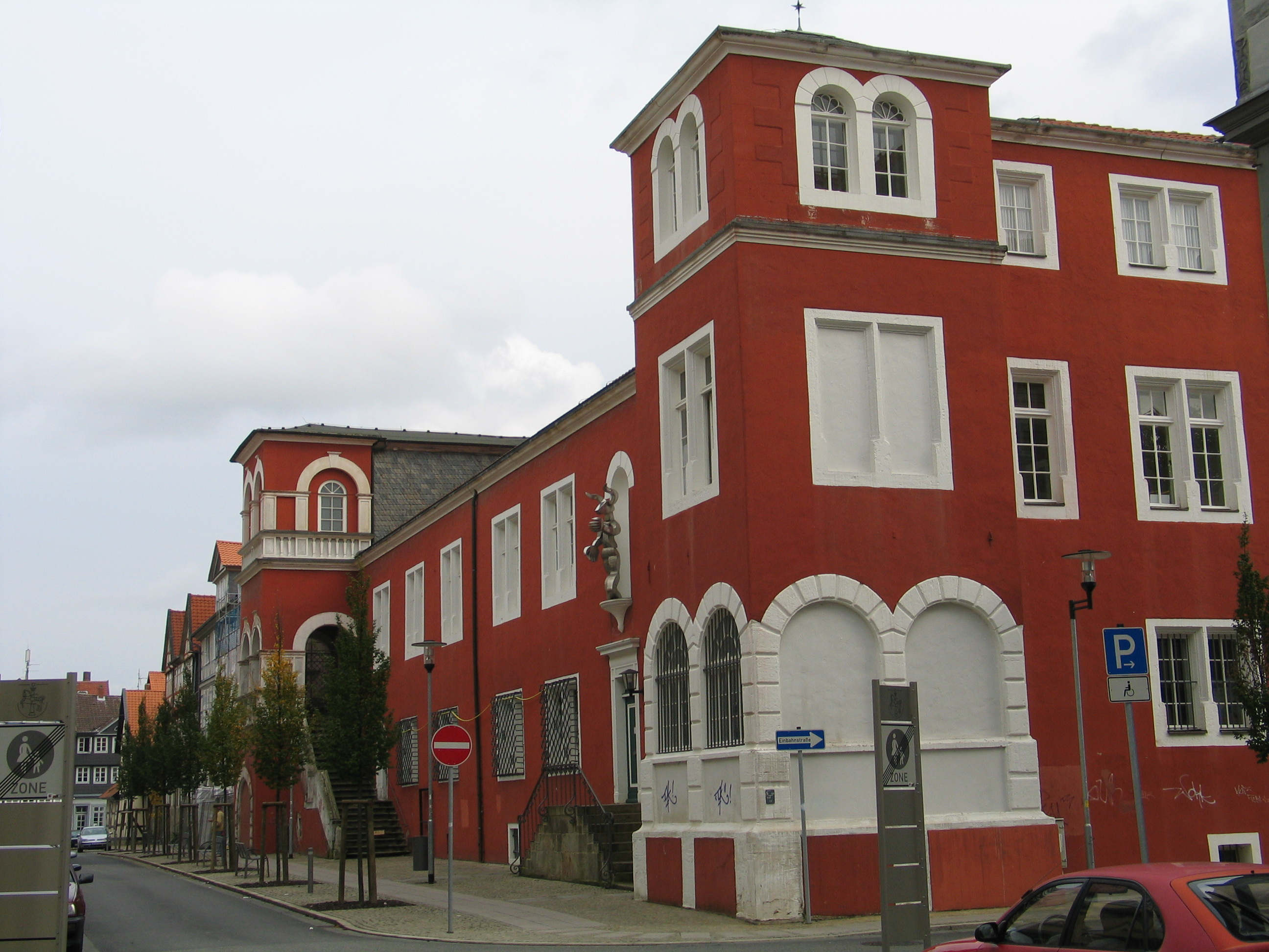 Haus entworfen von Hans Vredeman de Vries in Wolfenbüttel.